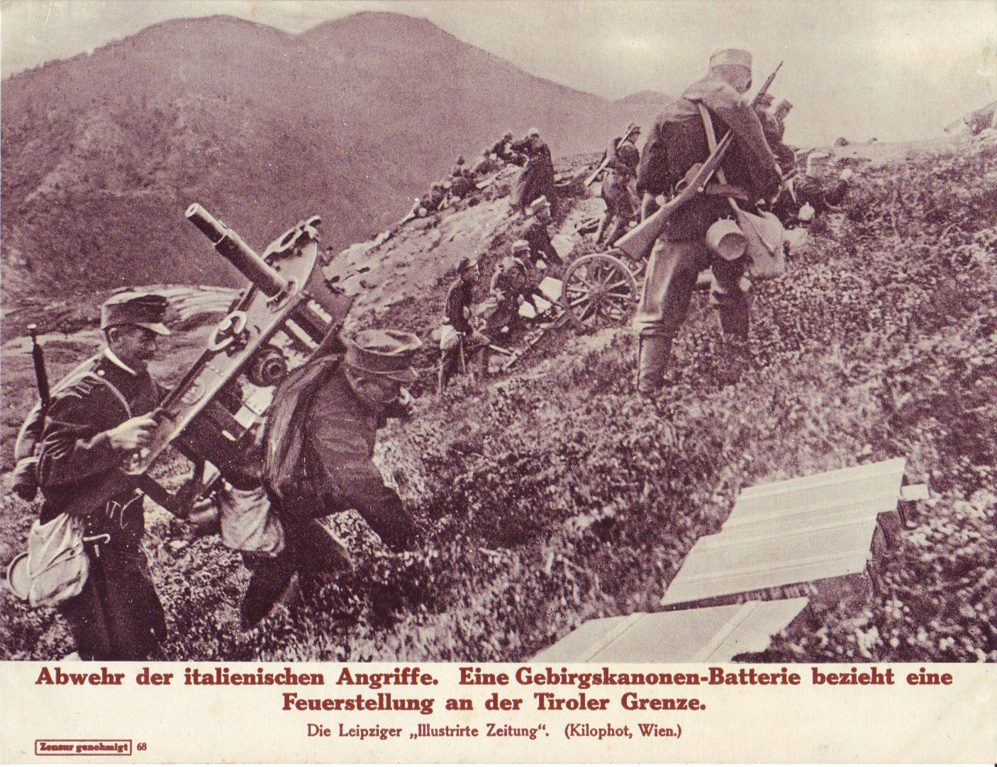 Postkarte